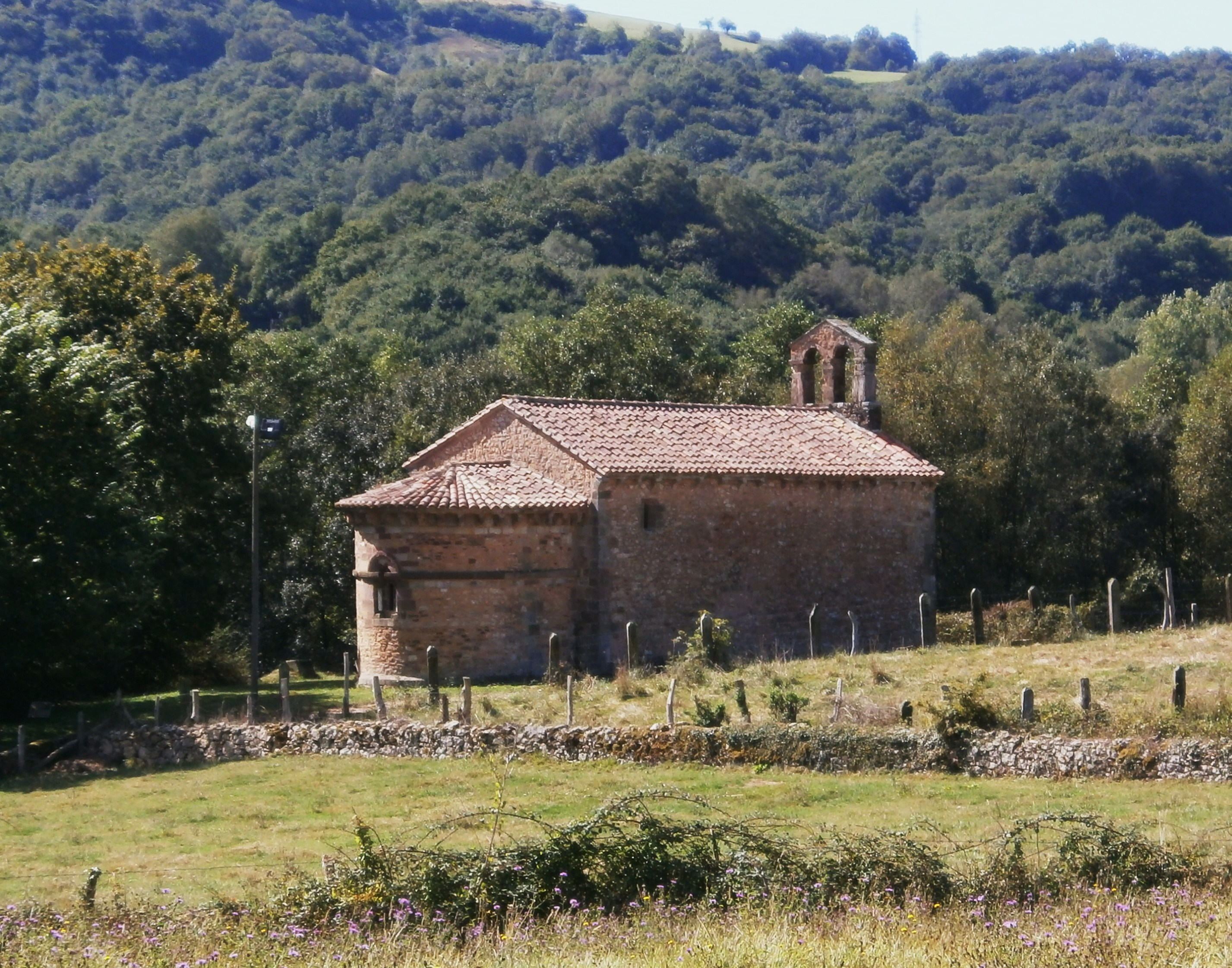 Iglesia de San Esteban Vista desde el norte-2